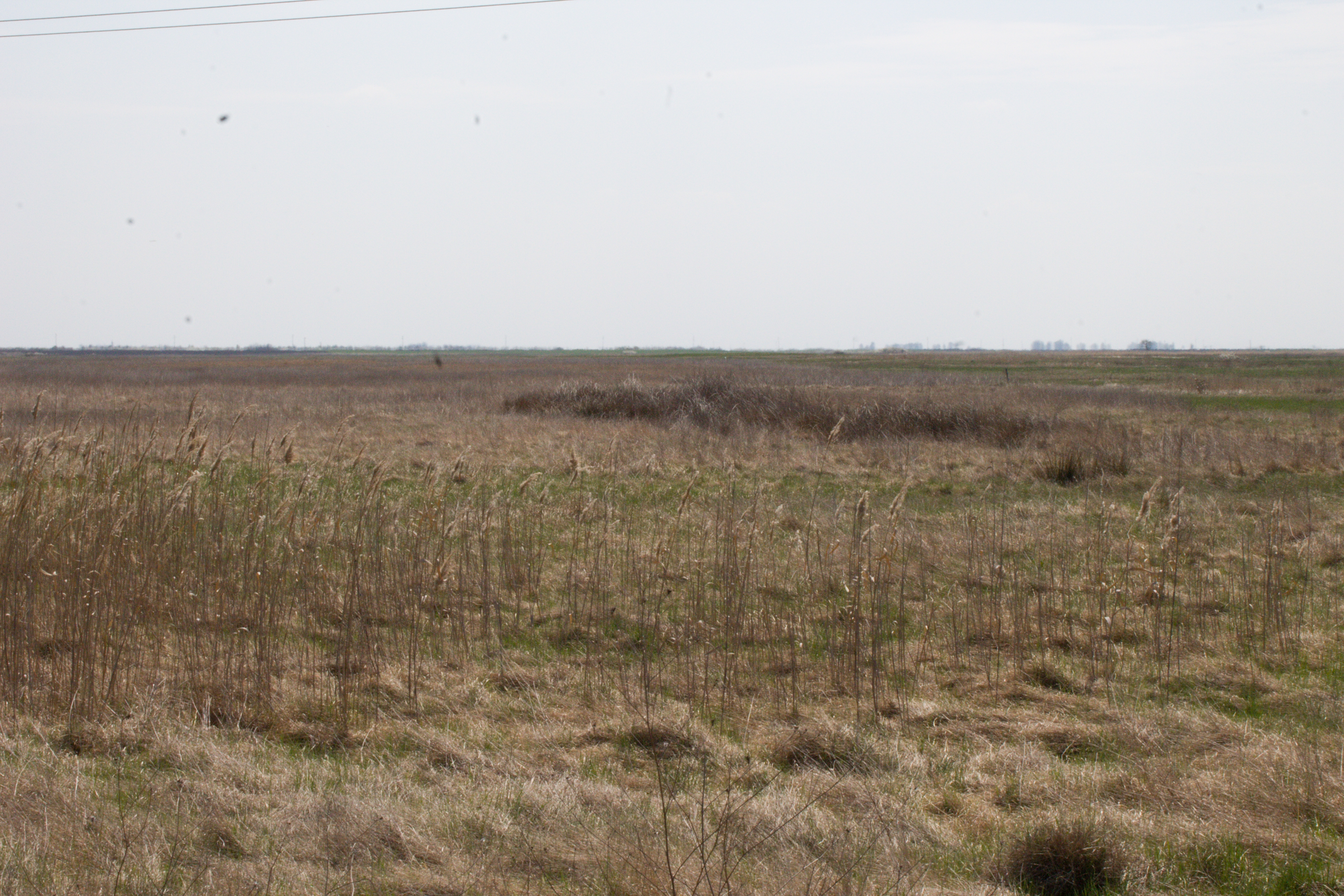 Slatinsko stanište u okolini sela Sečanj.